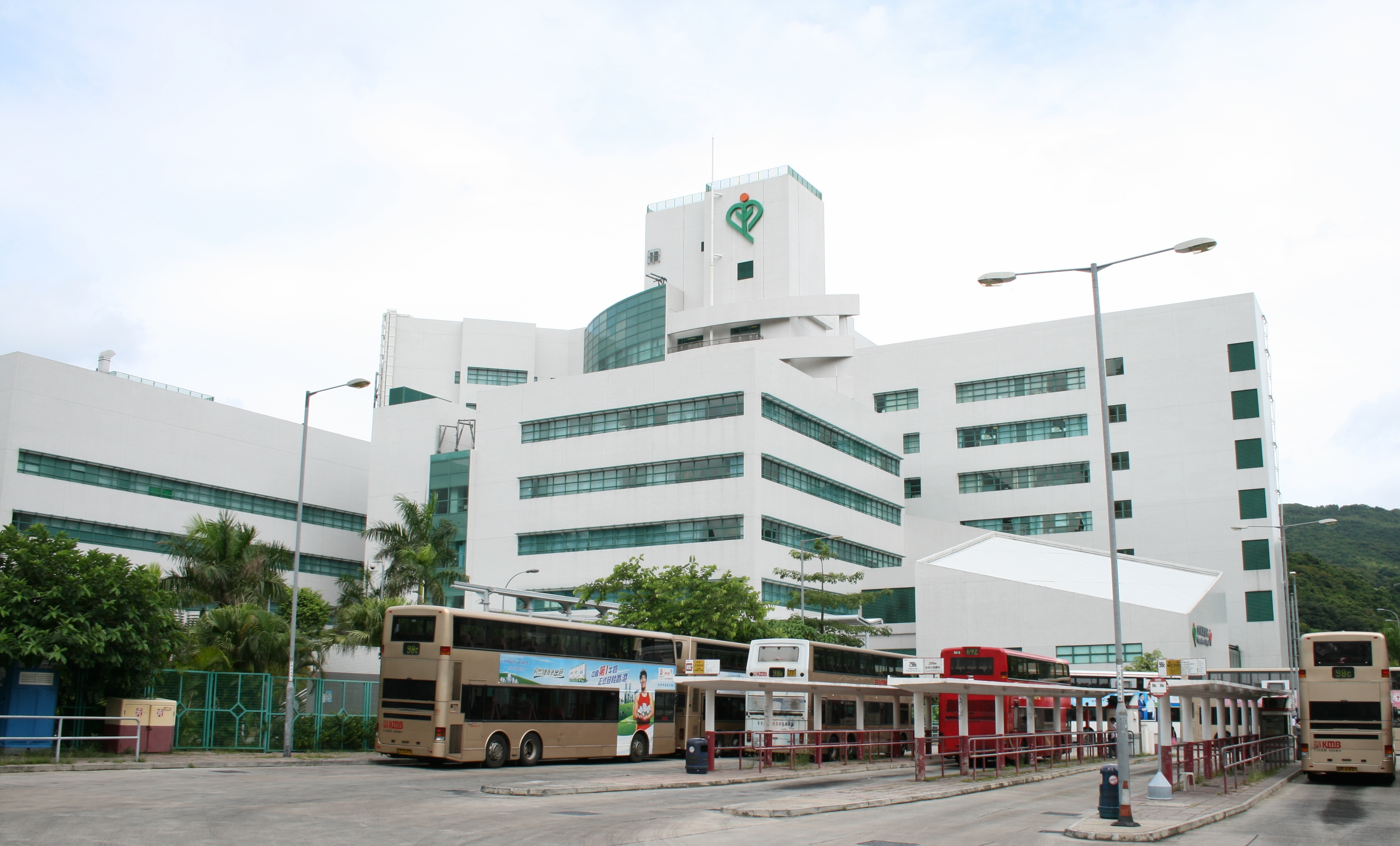 Tseung Kwan O Hospital 將軍澳醫院